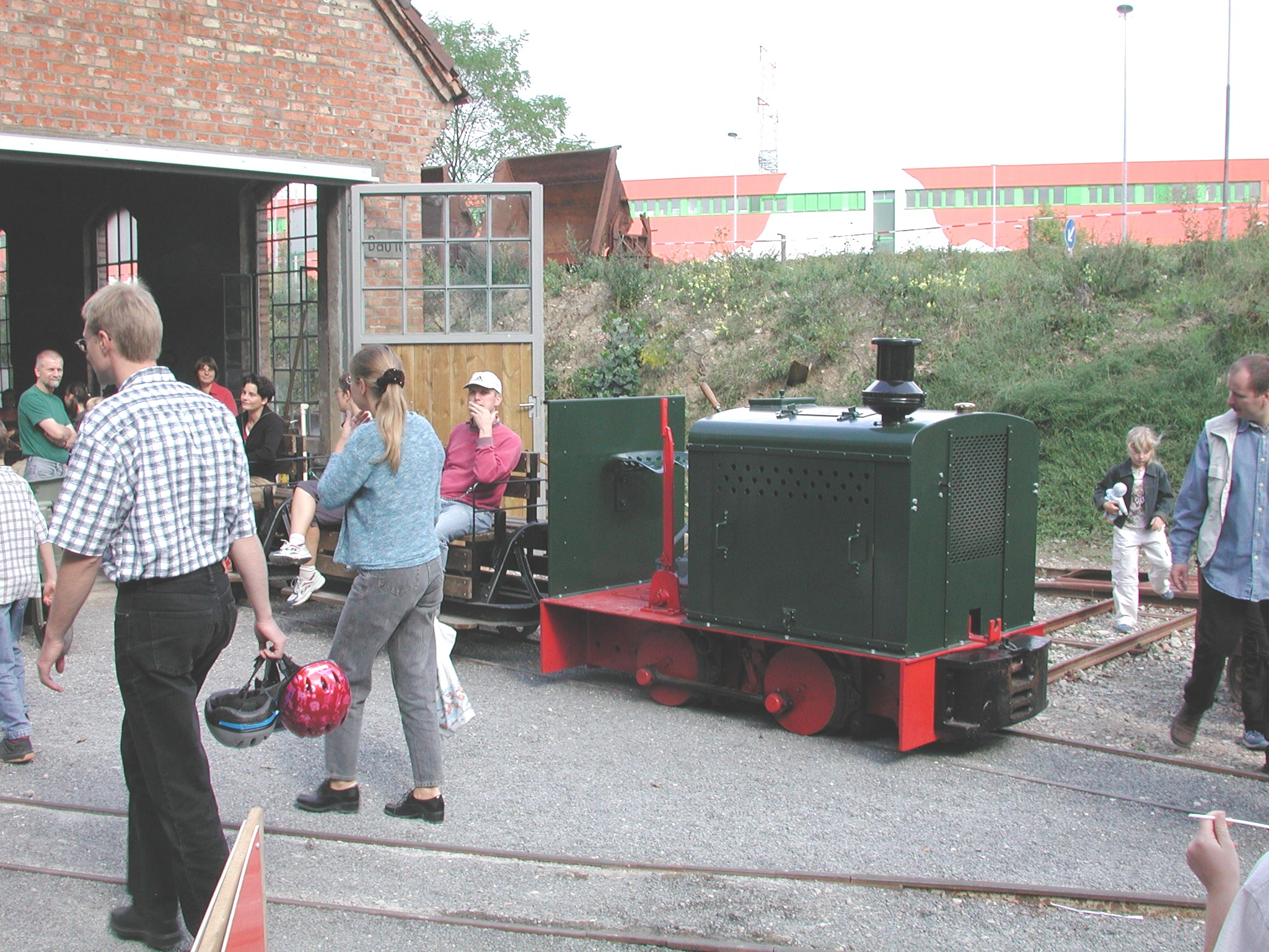 Feldbahnmuseum Wiesloch (Rhein-Neckar-Kreis) Baden-Württemberg Foto: Michael Linnenbach GNU FDL